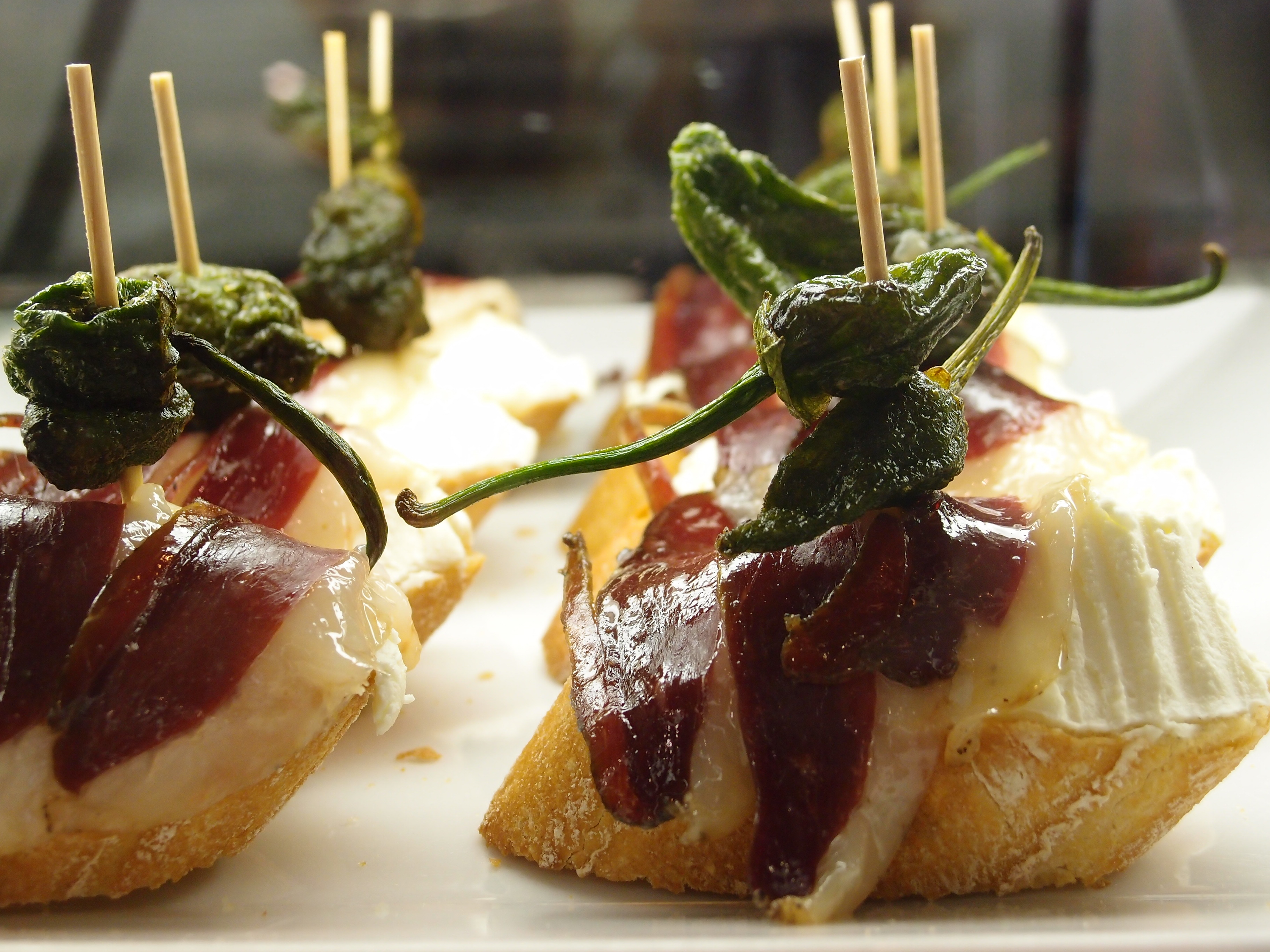 Pinchos mit Serrano-Schinken und Pimientos de Padrón in Figueres (Katalonien/Spanien) Datum: 11.09.2012 Urheber: Michael Pfeiffer alias User:Gordito1869 Quelle: privates Fotoarchiv des Urhebers(Katalonien/Spanien